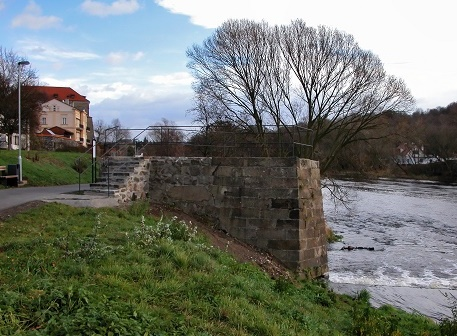 sokl na místě, kde stával Weiskopfův mlýn